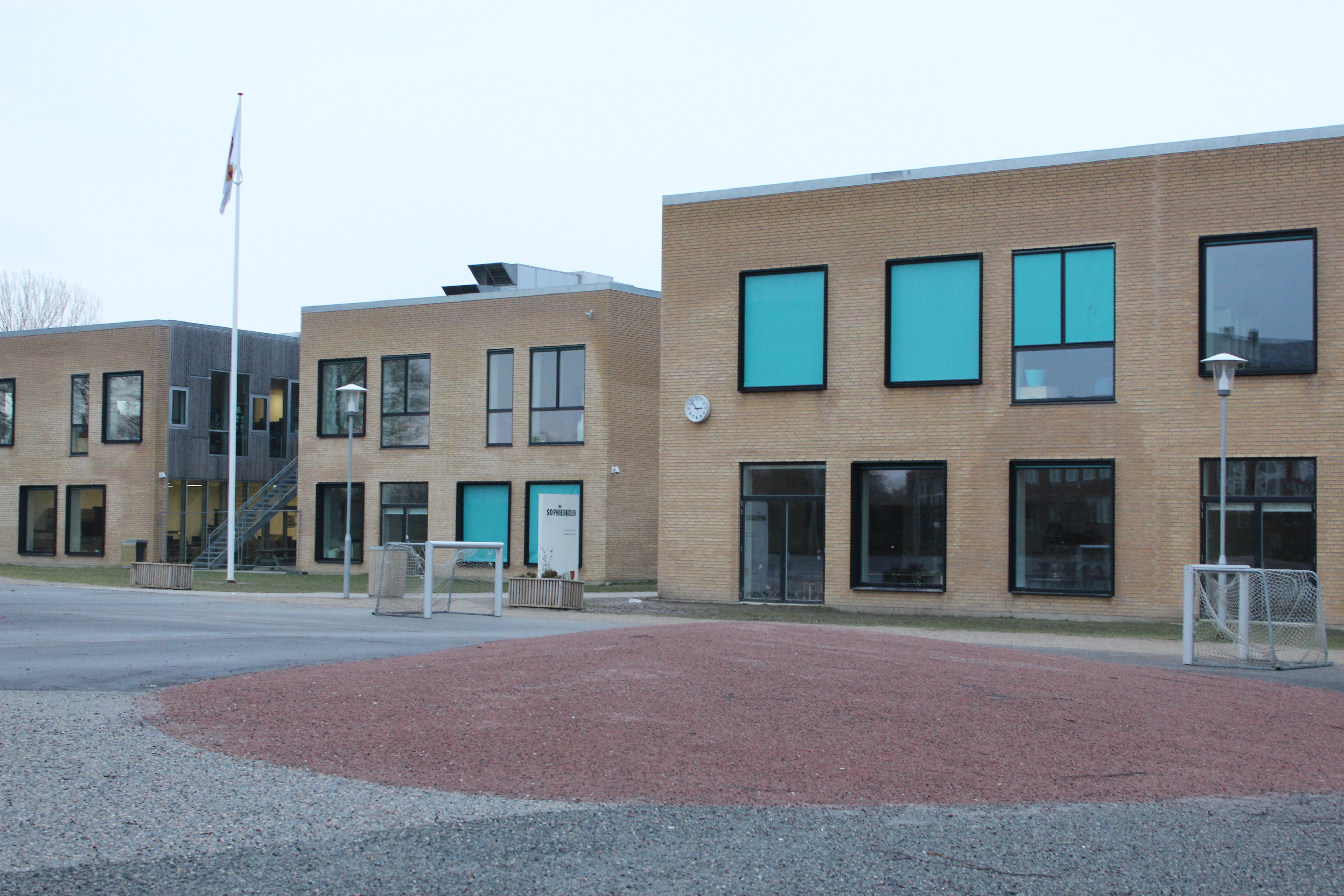 Folkeskole i Nykøbing Falster. Lige over for Nykøbing Katedralskole.